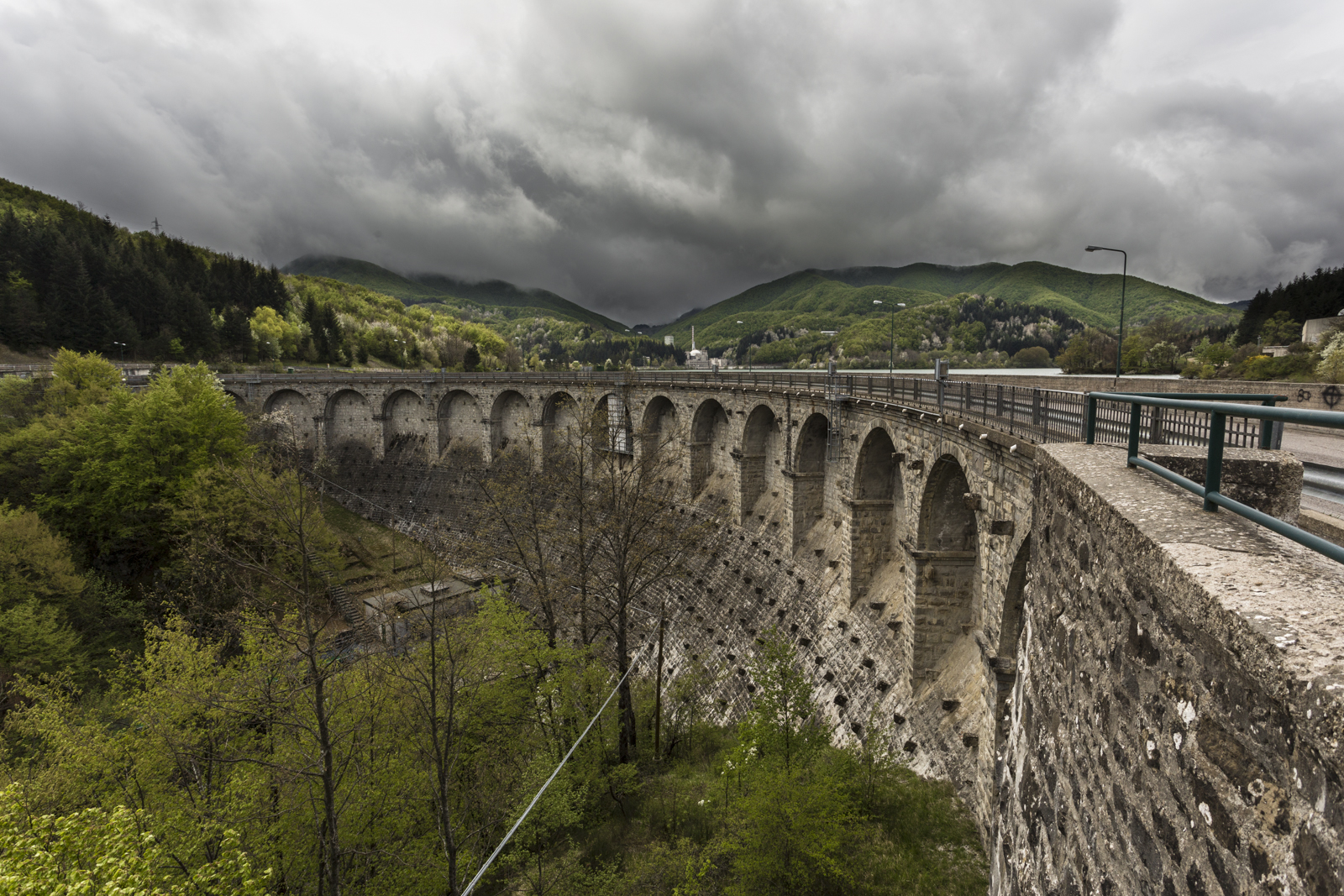 Panoramica del lago